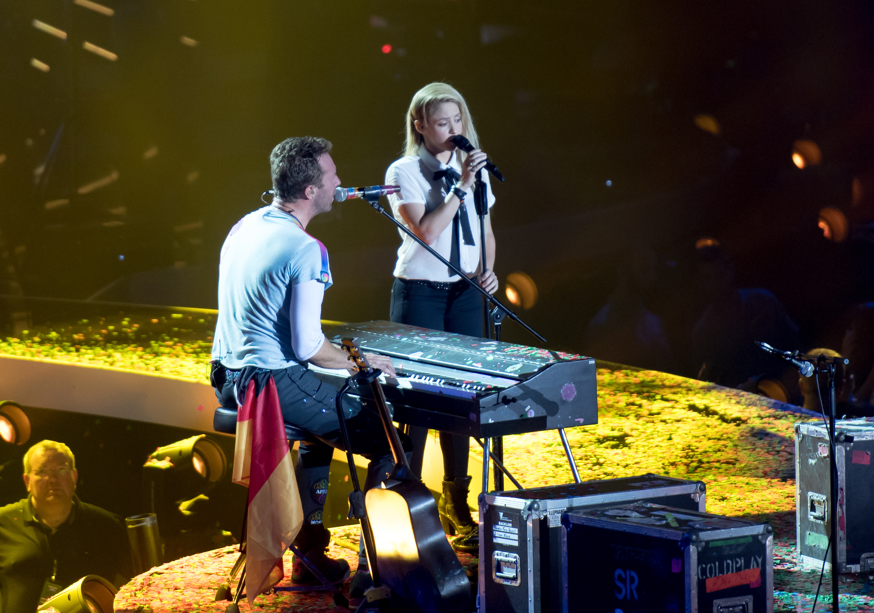 Shakira und Chris Martin beim Global Citizen Festival 2017